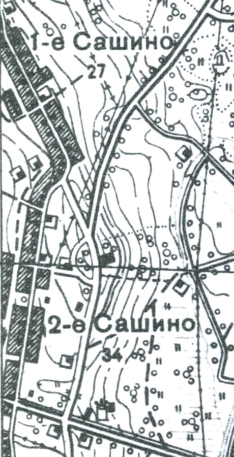 Топографическая карта Ленинградской области, квадрат О-35-12-Б-г (Петергоф), деревня Сашино